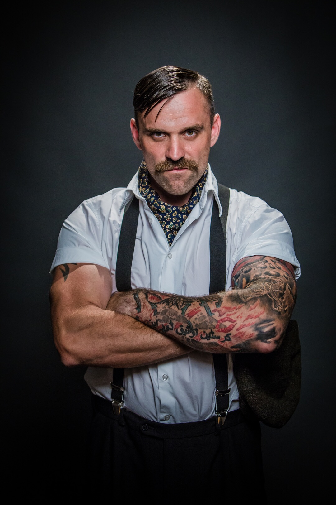 Stuntman/Stunt Koordinator/Schauspieler Joe Tödtling